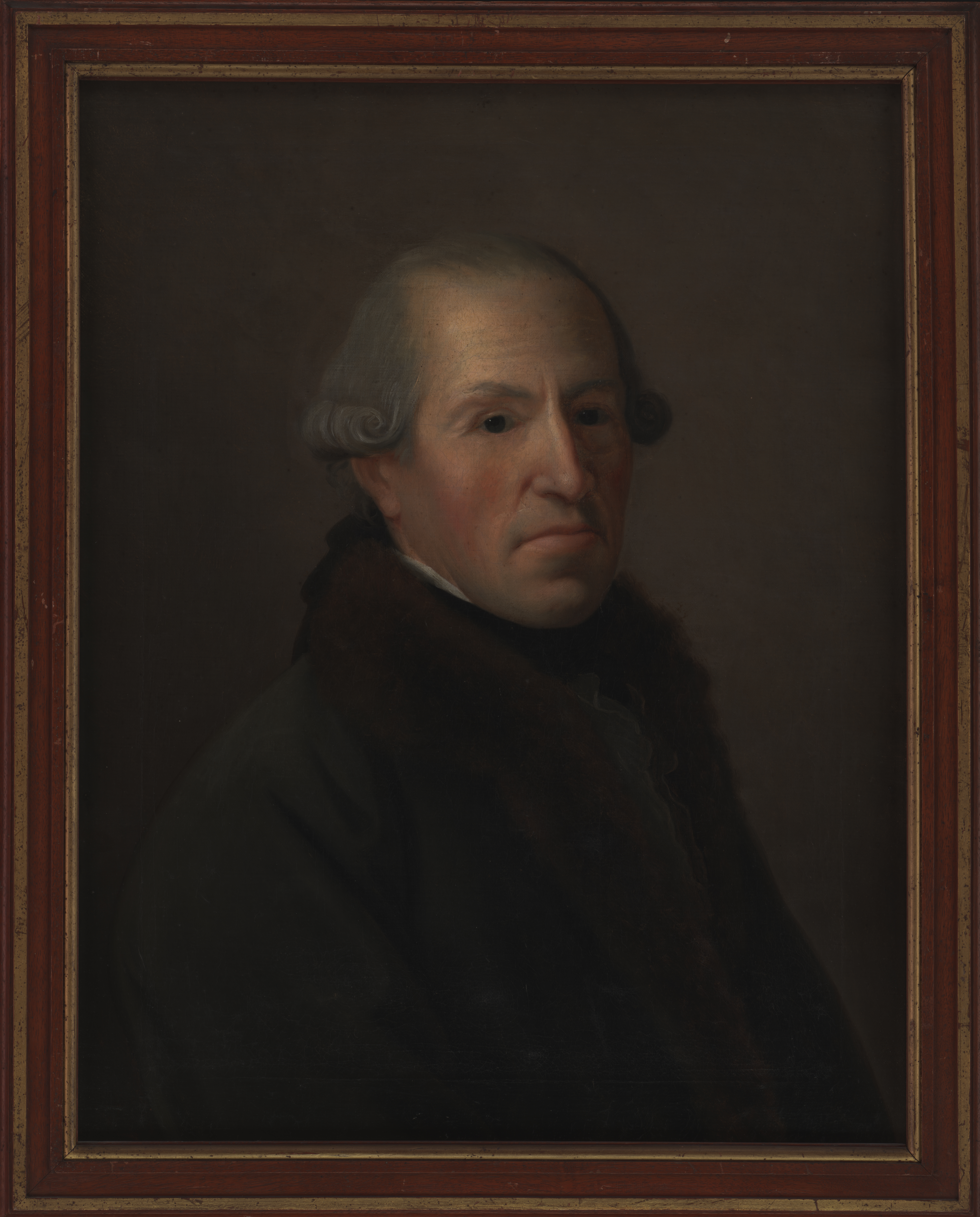 Kopie des sich im Familienbesitz im Zellwegerschen Fünfeckpalastes befindlichen, von F. M. Diogg signierten Originals